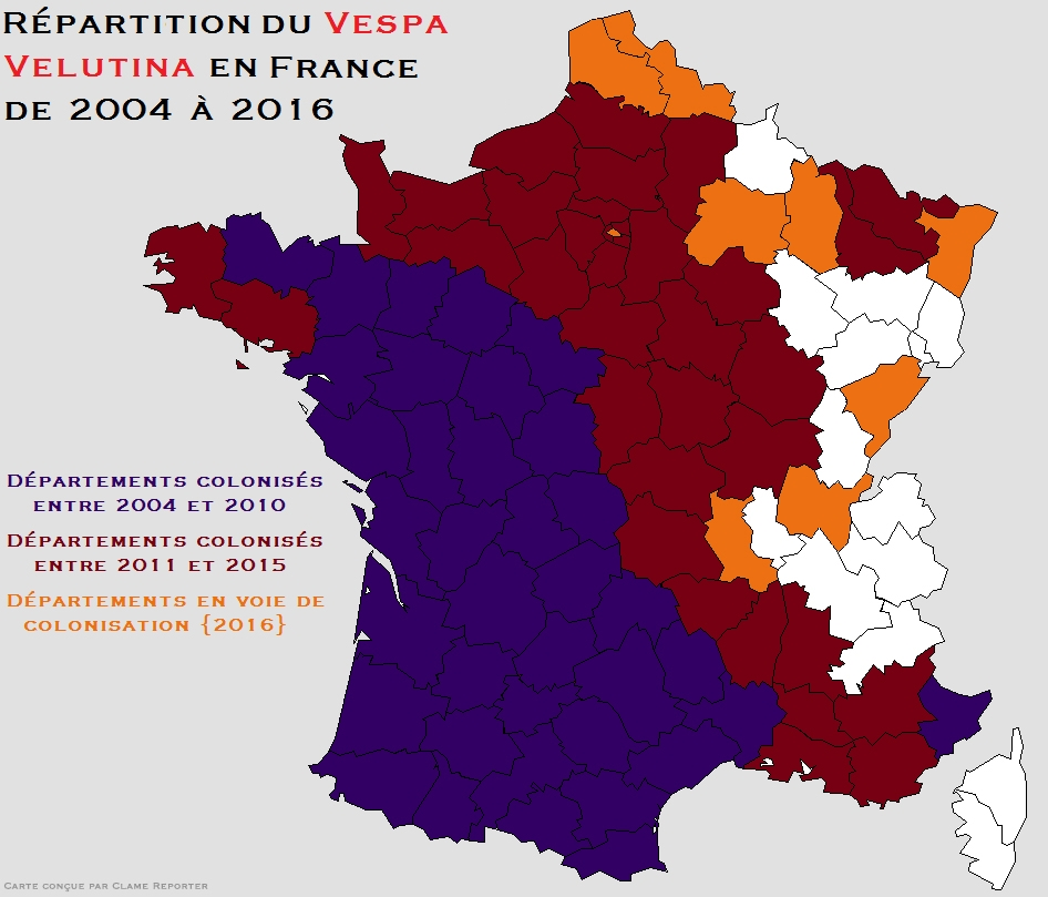 Carte représentant la répartition géographique du Vespa Velutina depuis son apparition sur le territoire français métropolitain selon l'INPN {Inventaire National du Patrimoine Naturel} et diverses sources médiatiques.